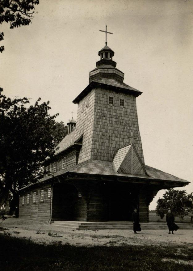 Беларуская (тарашкевіца): Дайлідкі (Dajlidki). Касьцёл